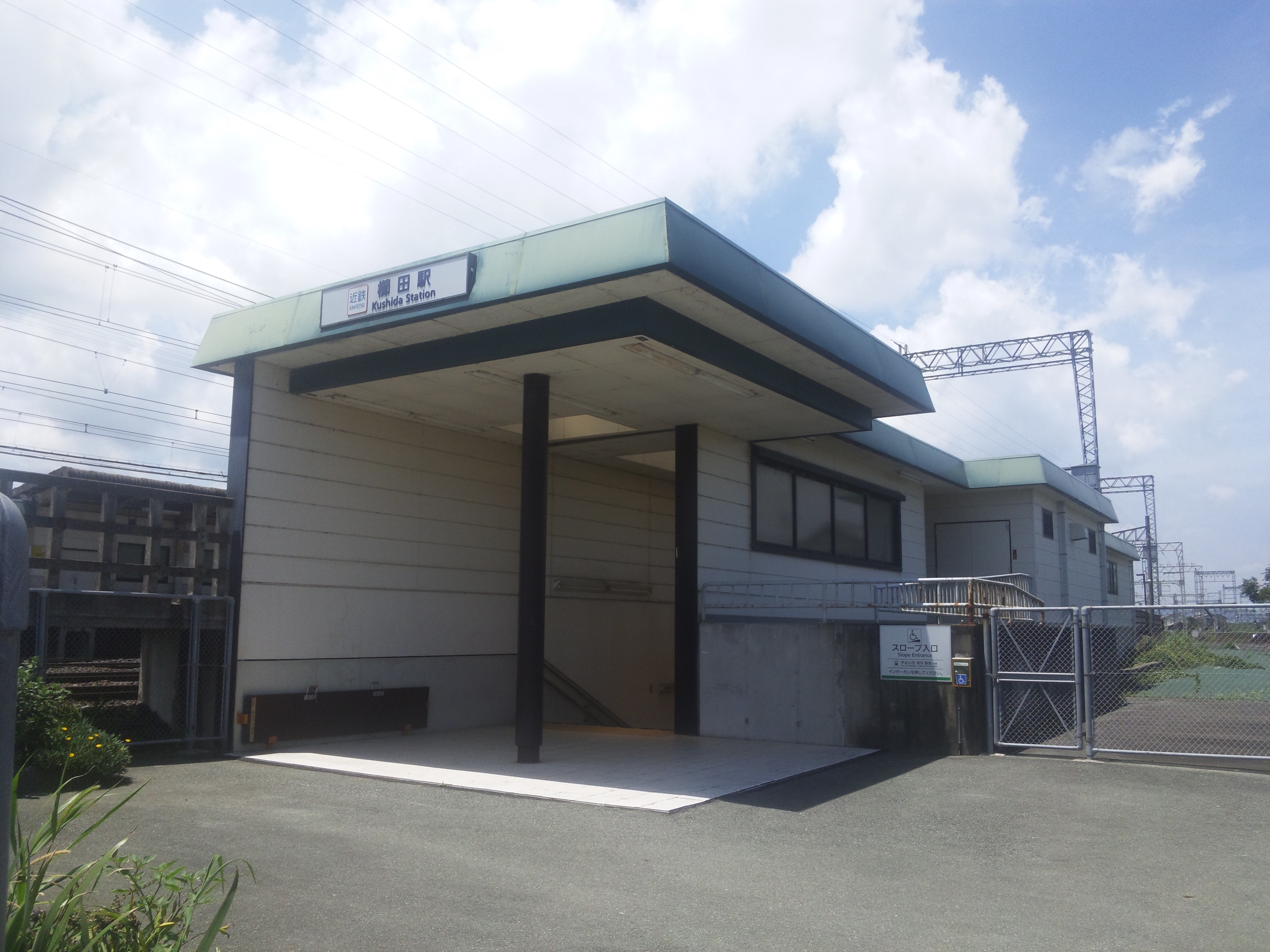 櫛田駅(北出口)